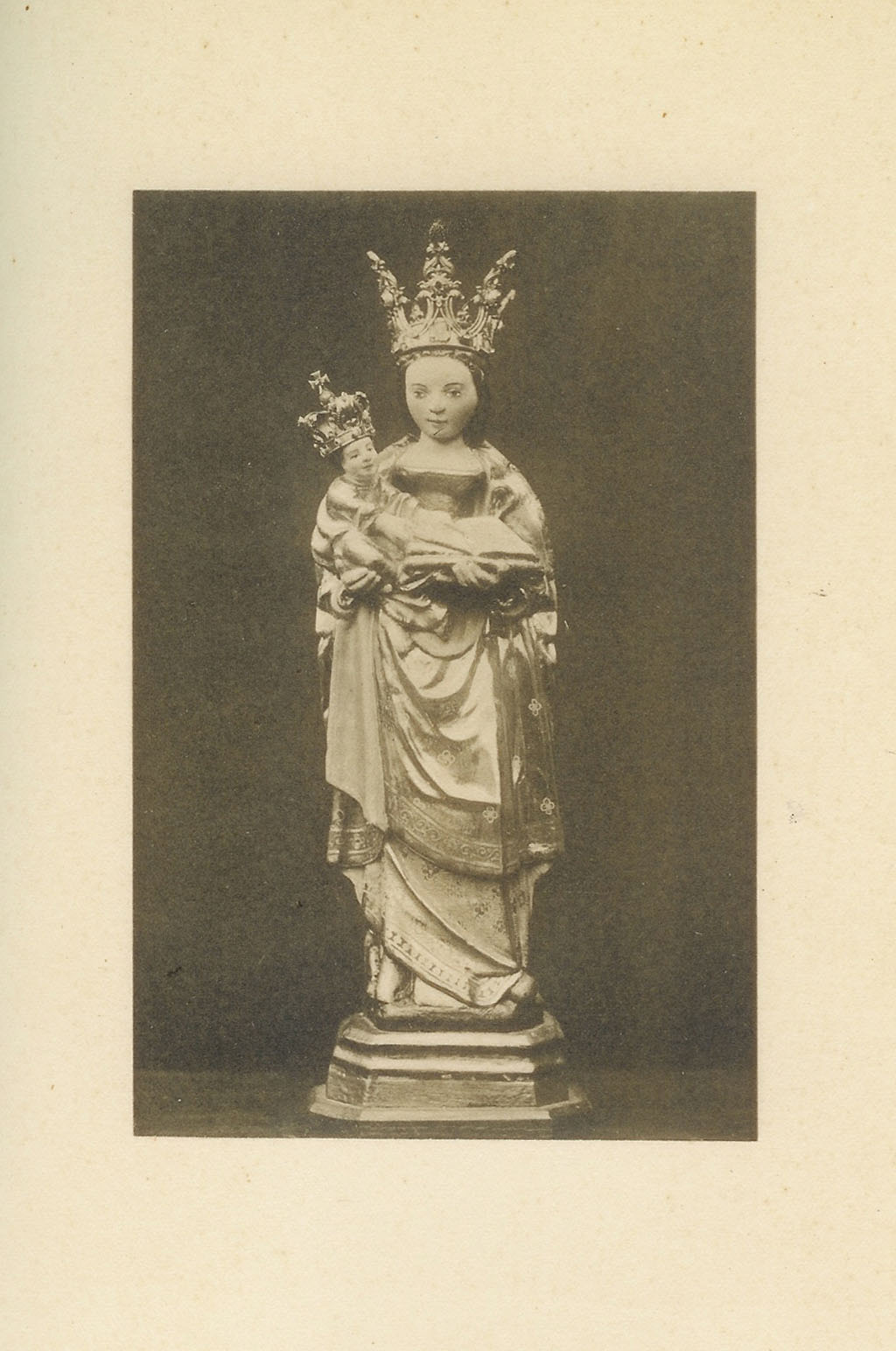 Uit Maria's Heerlijkheid in Nederland van pater Kronenburg ca. 1900